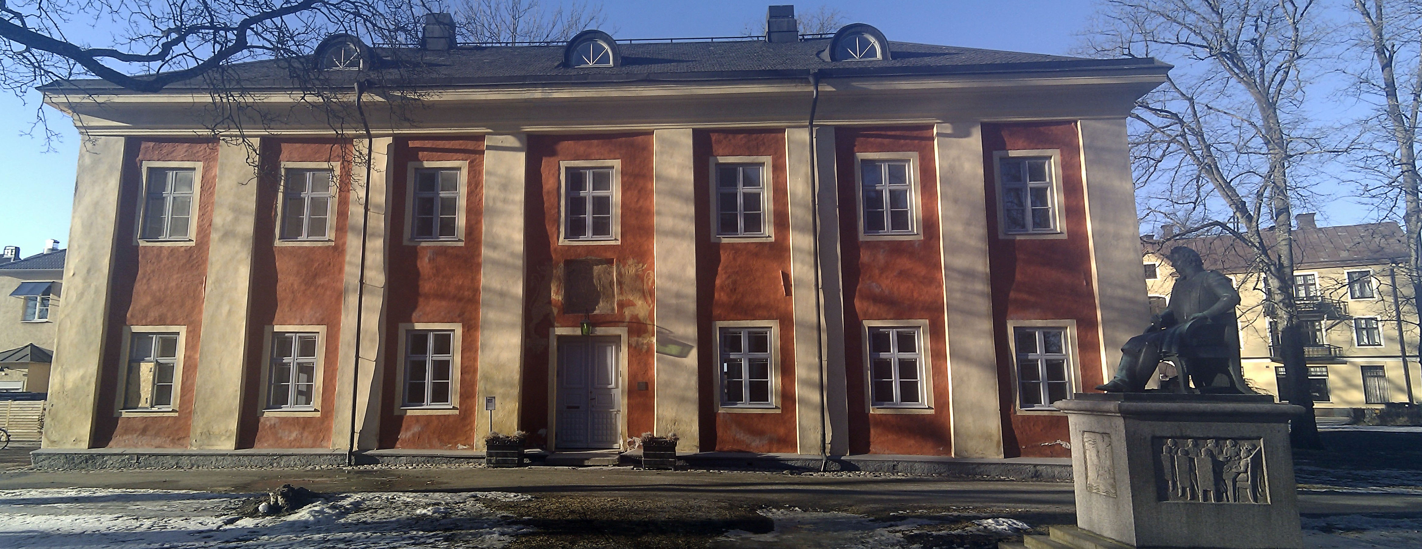 Karolinerhuset i Växjö sedd från huvudingången